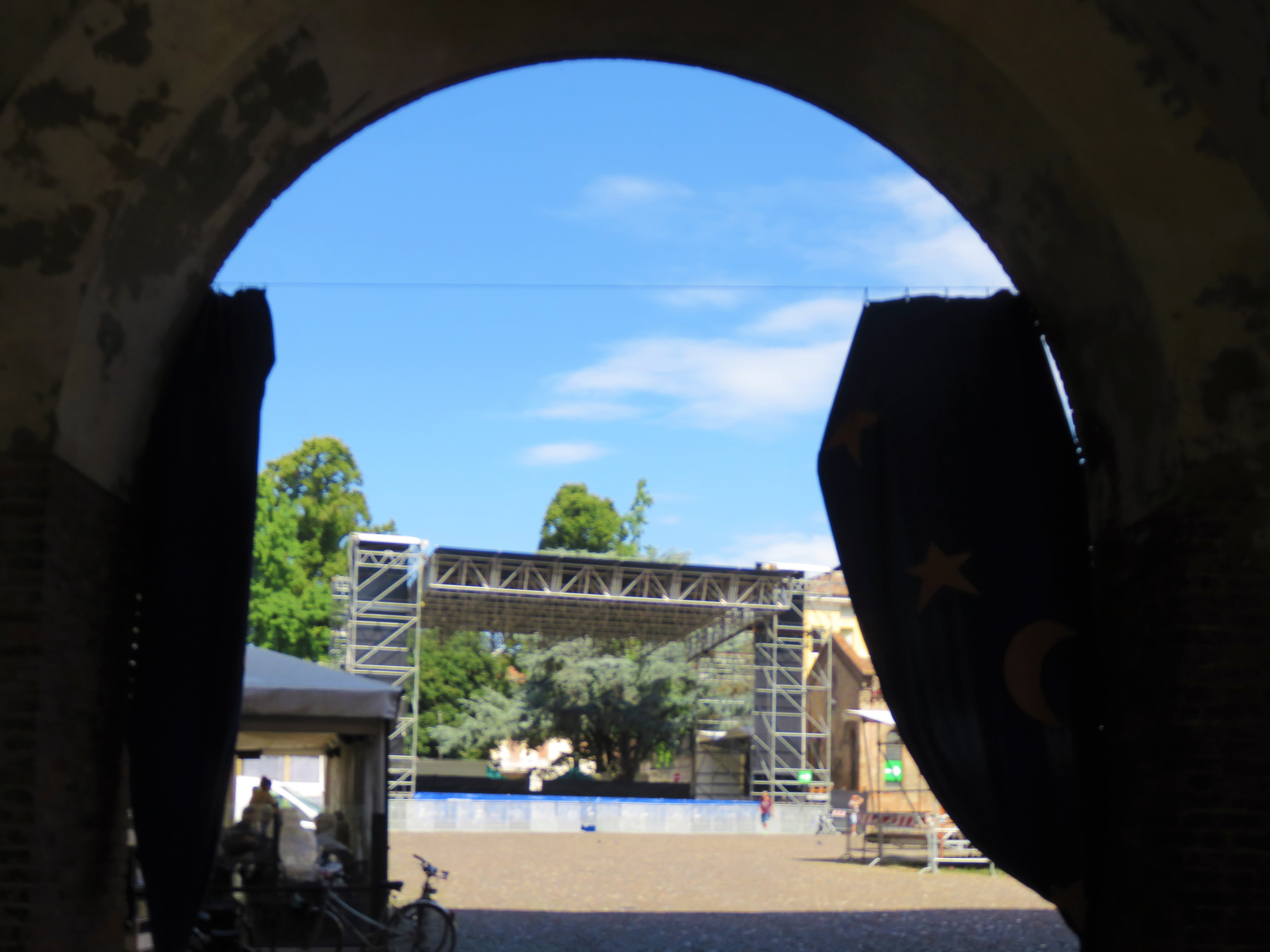 Piazza Castello vista dal volto di via Coperta